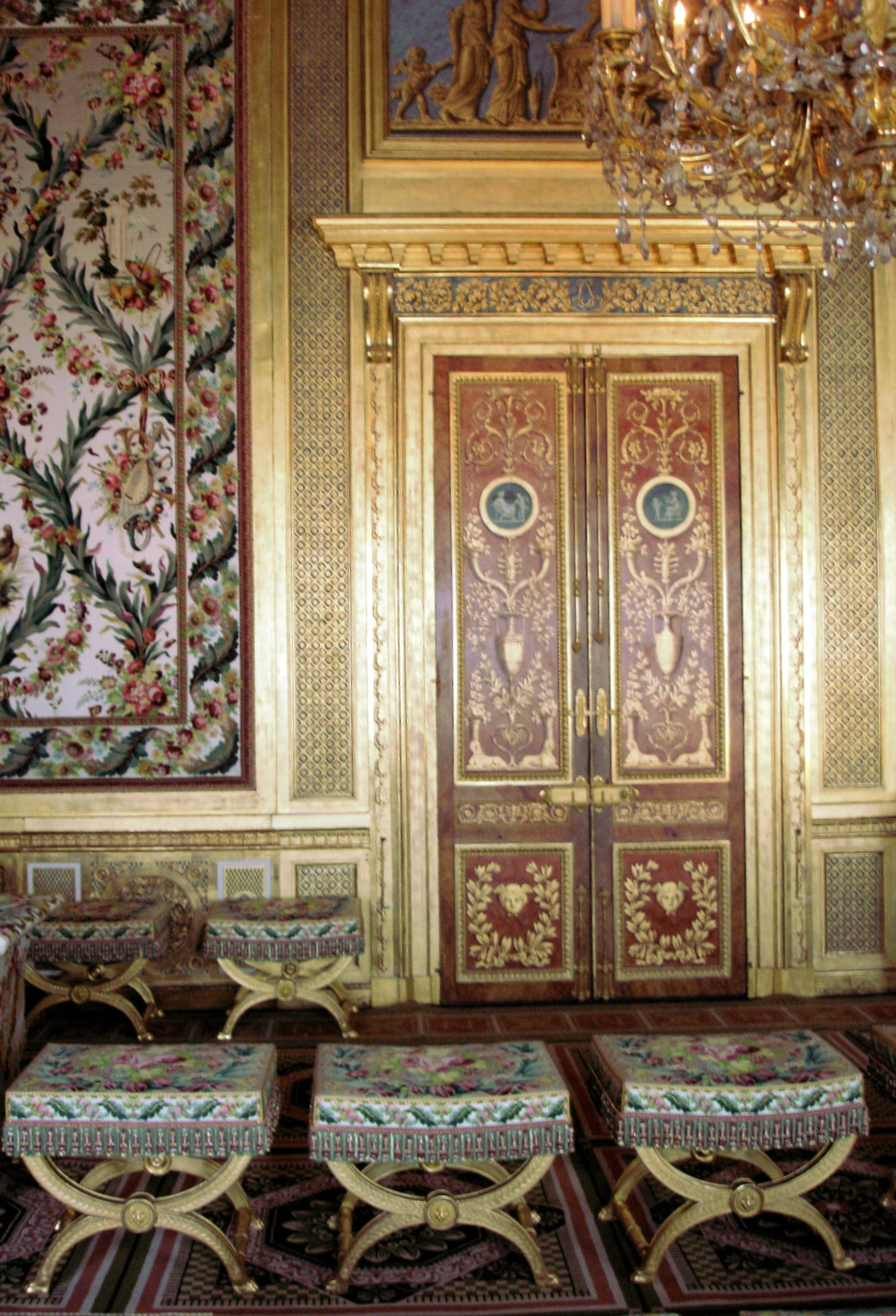 Tabourets dans la chambre à coucher de l'Impératrice au château de Fontainebleau